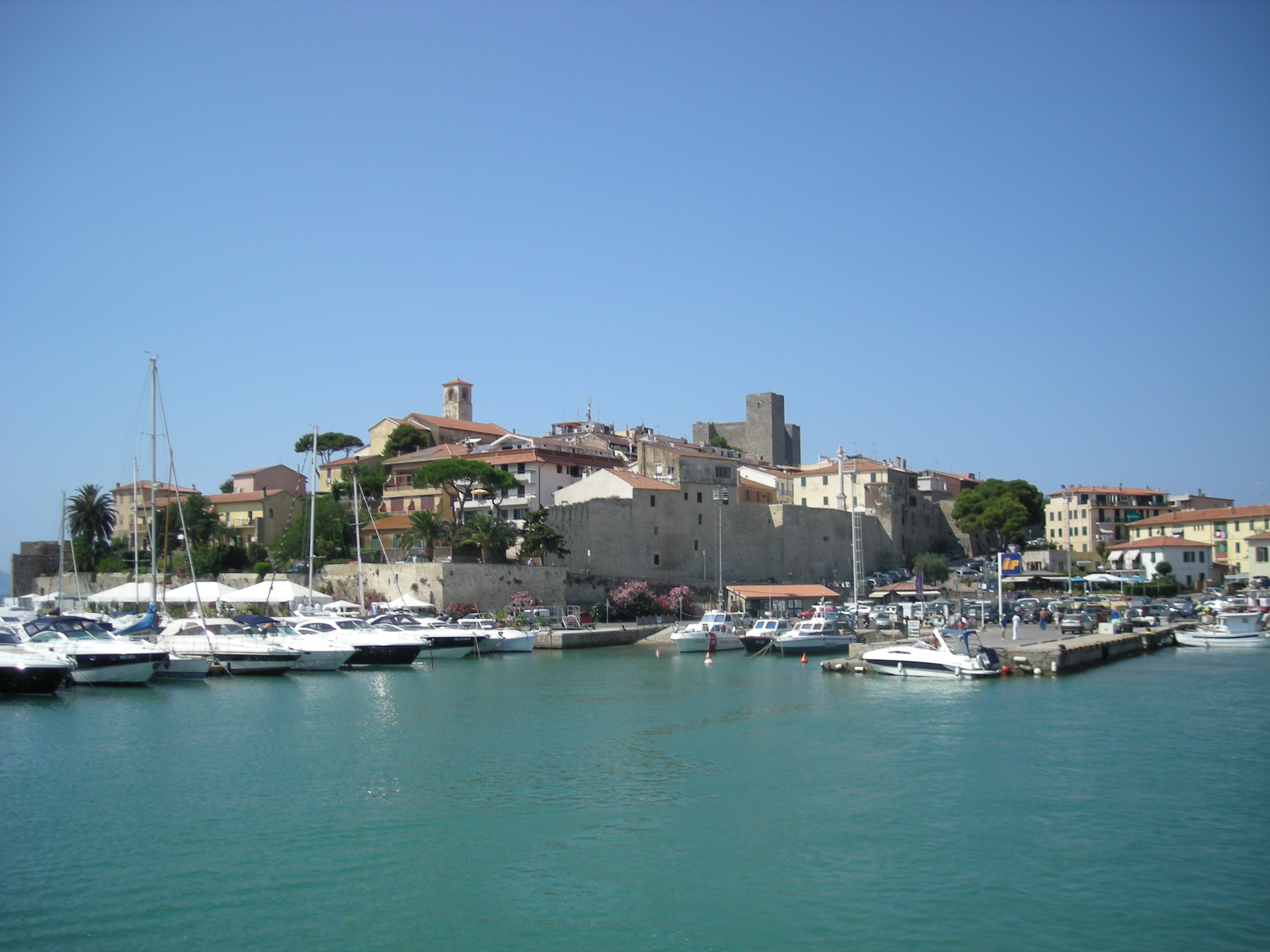 Talamone